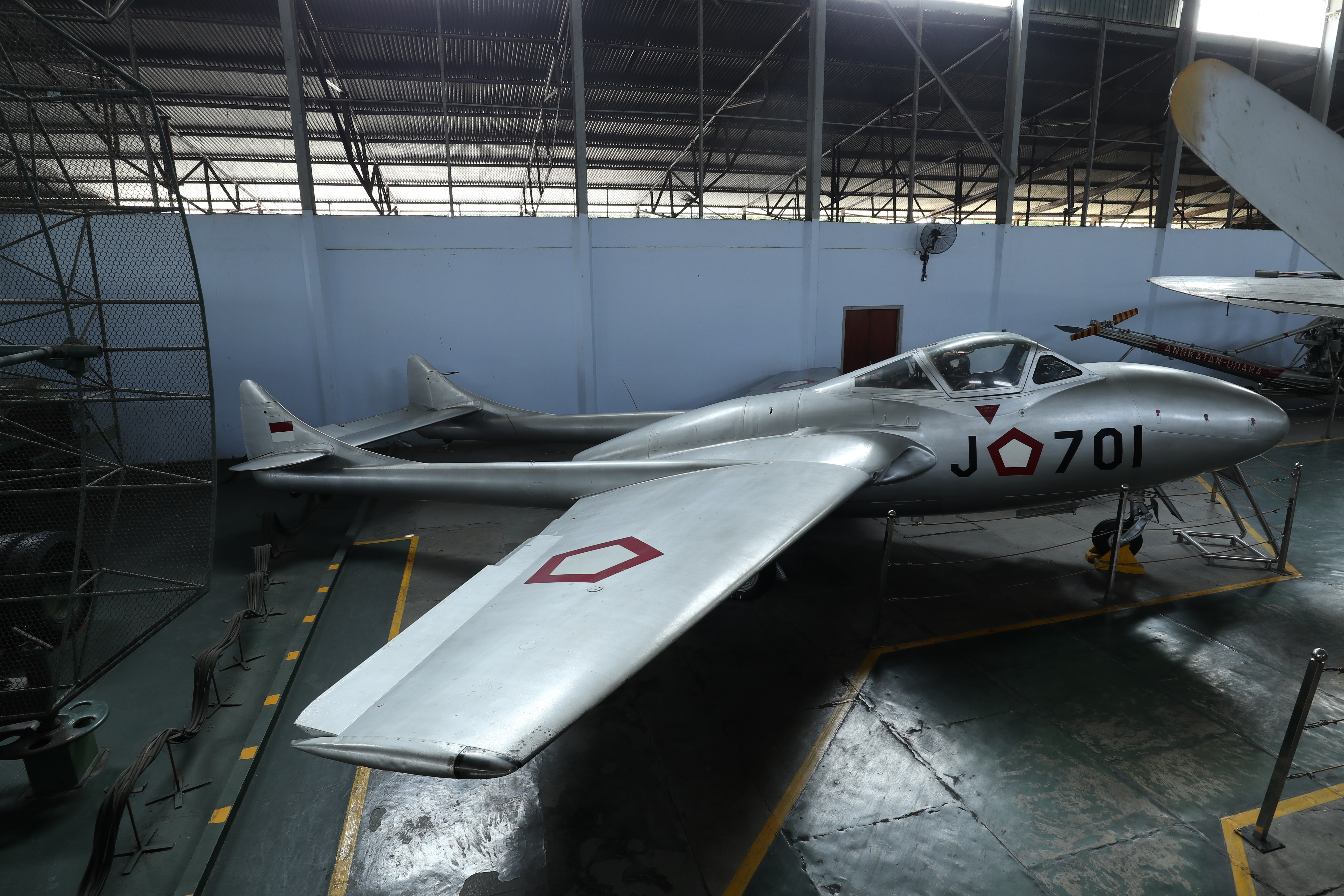 Pesawat DH-115 Vampire, TNI AU